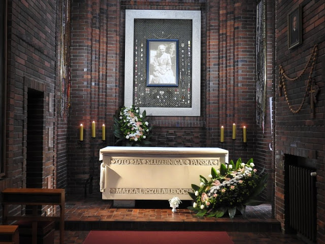 САРКОФАГ В ЯКОМУ ЗНАХОДИТЬСЯ НЕТЛІННЕ ТІЛО СВЯТОЇ